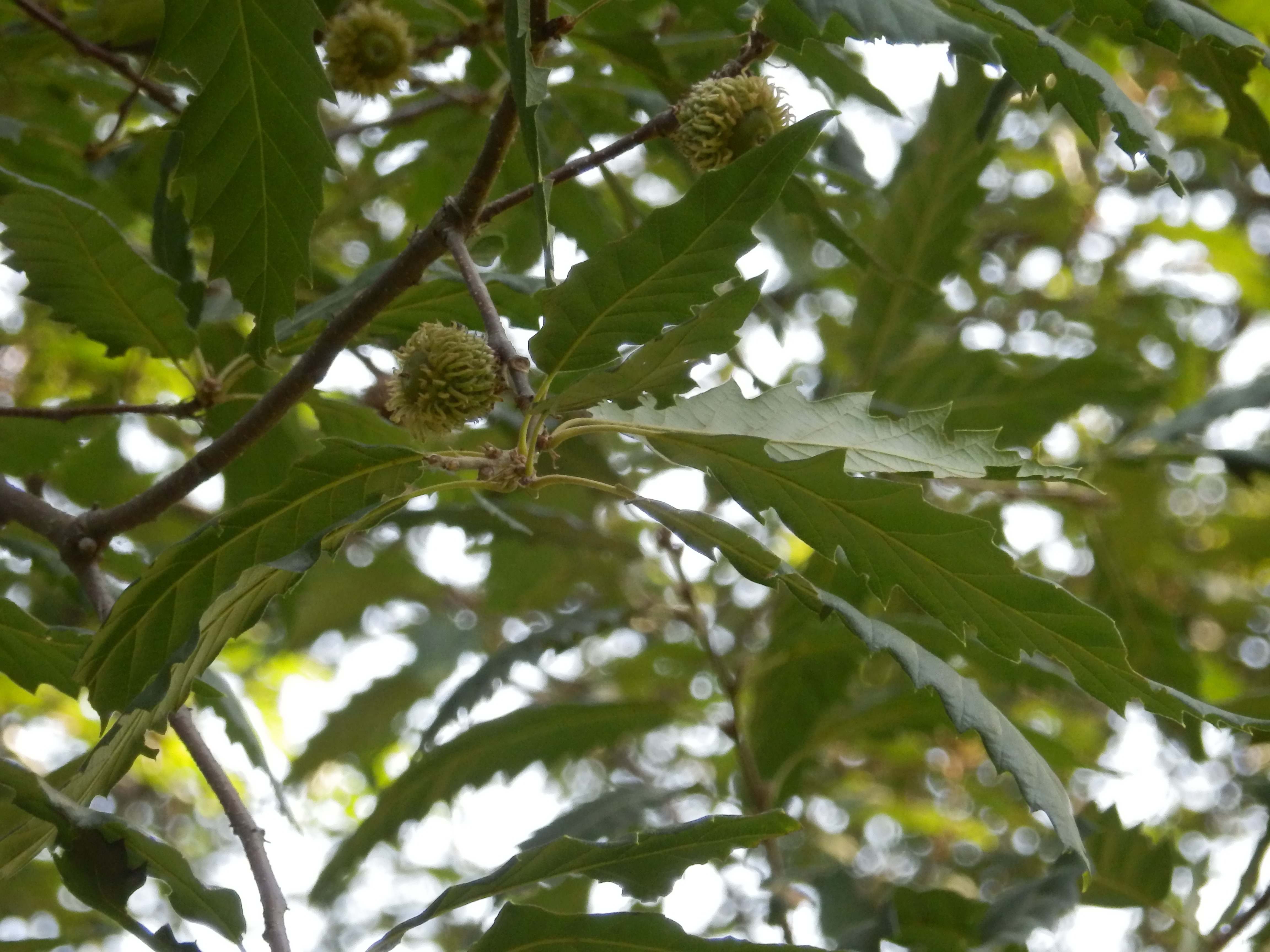 Плоды дуба каштанолистного, заповедник "Тростянец", Черниговская область, Украина (made by Paliienko Konstantin)